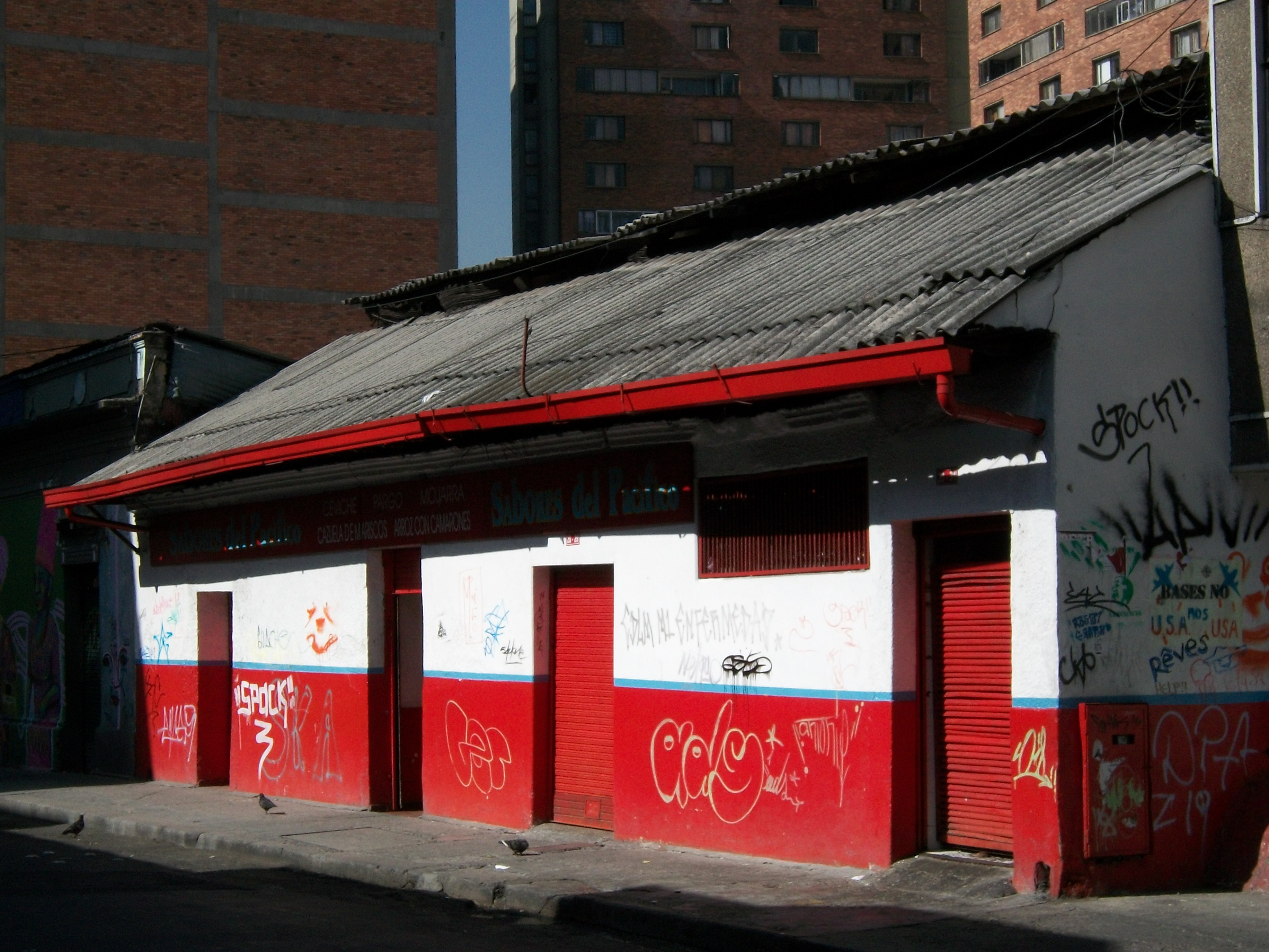 Bogotá, barrio Las Nieves, loaclidad de Santa Fe. Cra 4 con calle 20.